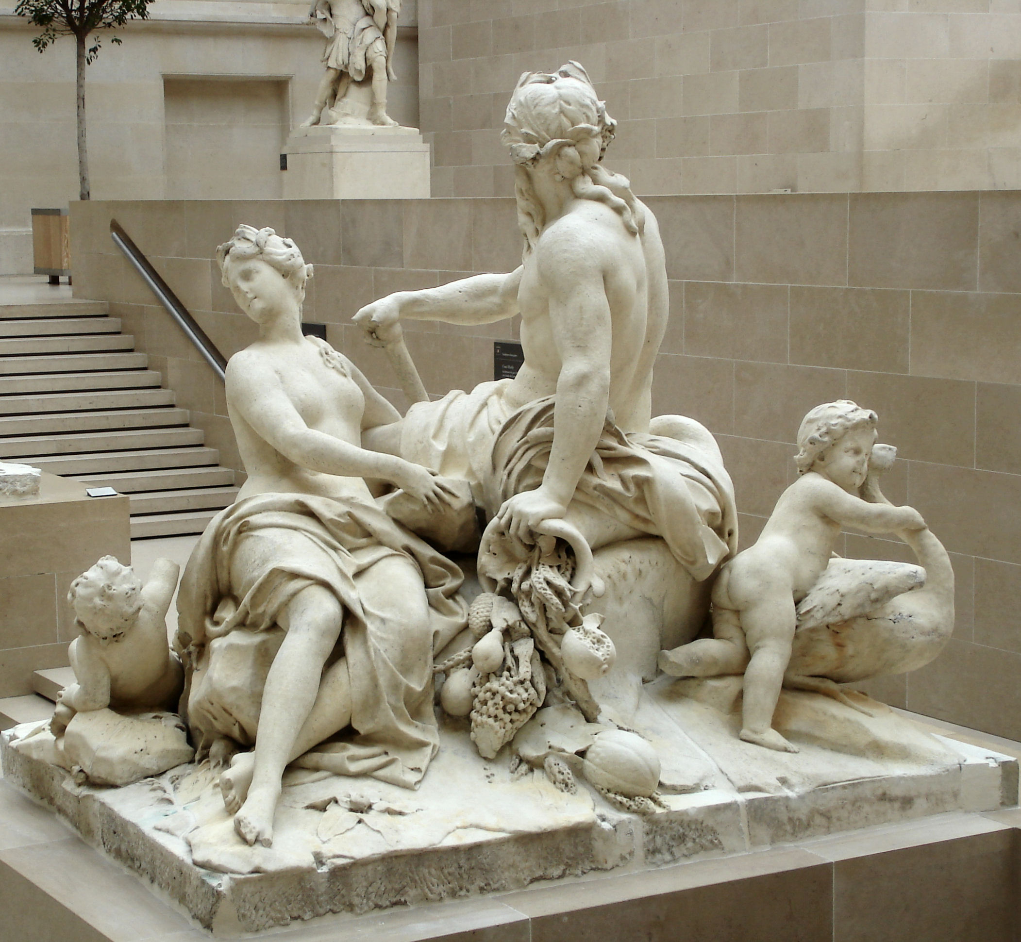 MarbreGroupe destiné à la pièce d'eau des Nappes du parc de Marly avec La Loire et le Loiret de Corneille Van Clève et des groupes représentant d'autres rivières par les sculpteurs Anselme Flamen et Simon Hurtrelle. Après la confection du modèle en plâtre en 1699,l'exécution en marbre se poursuivit de 1701 à 1712, date apposée sur le marbre. Le groupe a été porté près du bassin occidental du jardin des Tuileries dès 1719.Restauré grâce au mécénat du PMU, 2004 - 2005Provenant du jardin des Tuileries, 1993